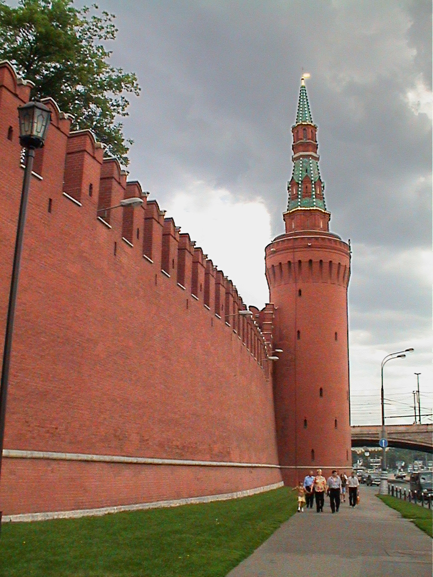 Tour Beklemishevskaïa ou Moskworetskaïa (Kremlin de Moscou)